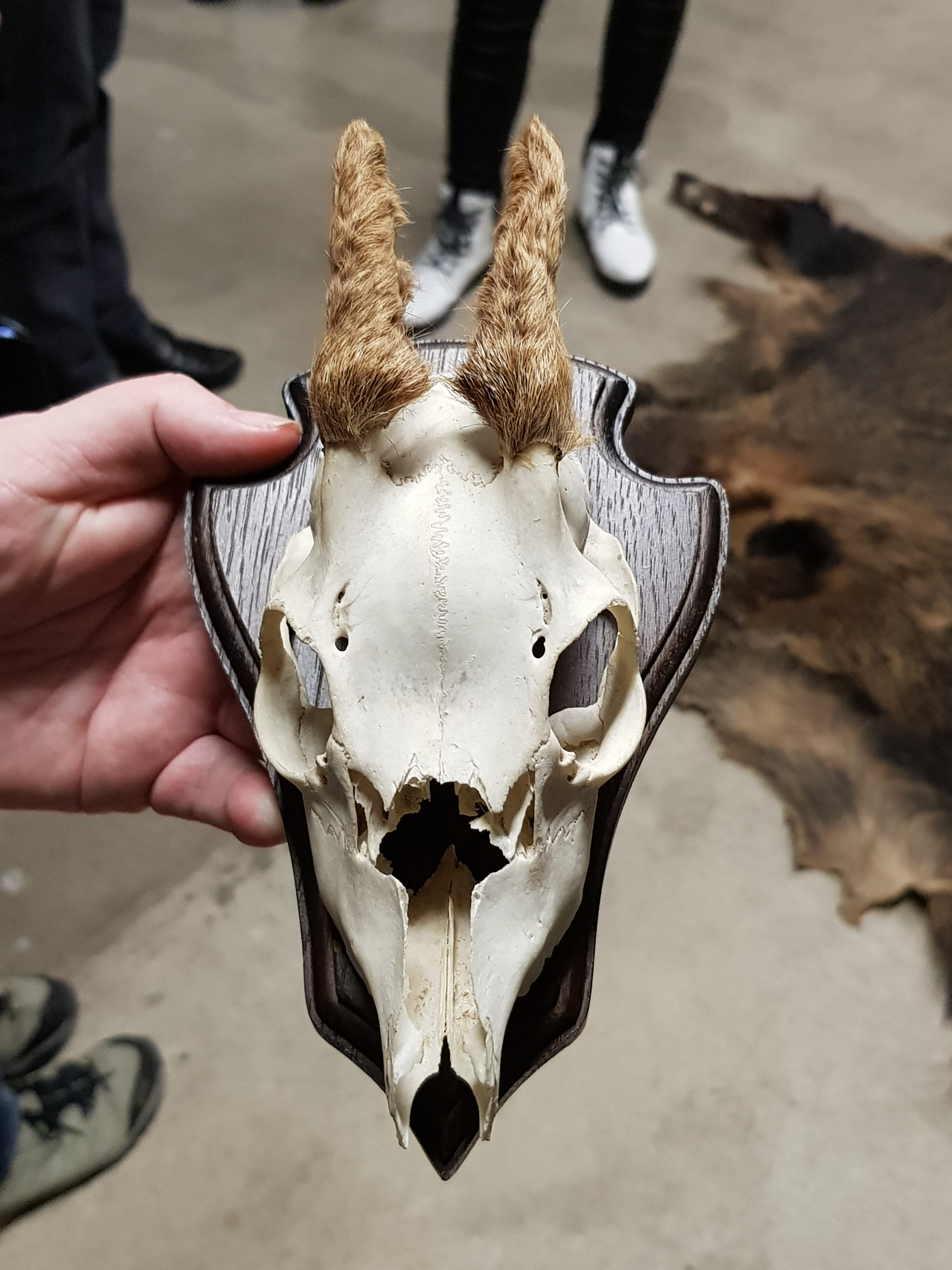 Rehgehörn (Spießer) mit Basthaut im Jagdmuseum in Schalksmühle, Asenbach 9.